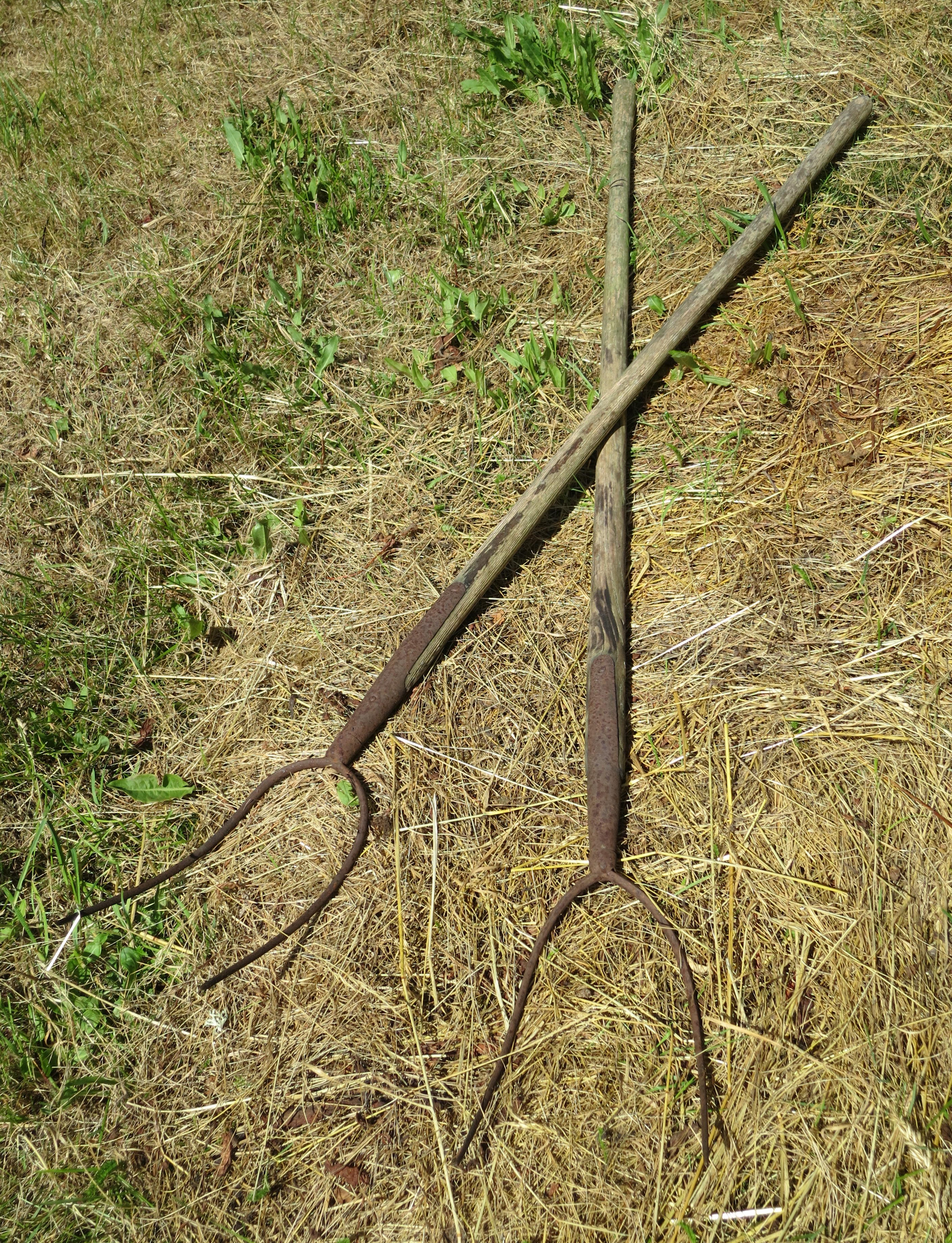 Två hötjugor